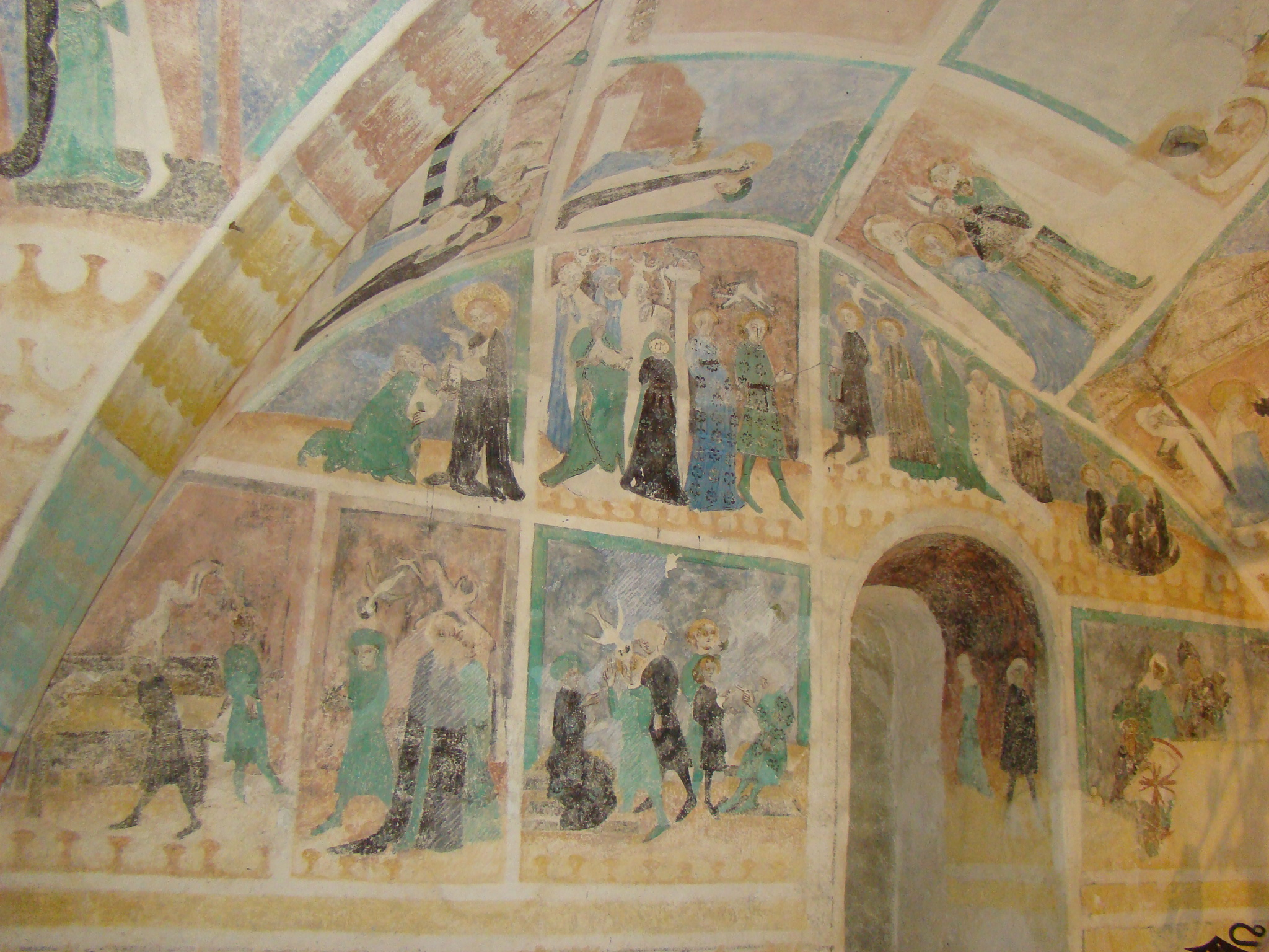 Johanneskirche in Gemmrigheim